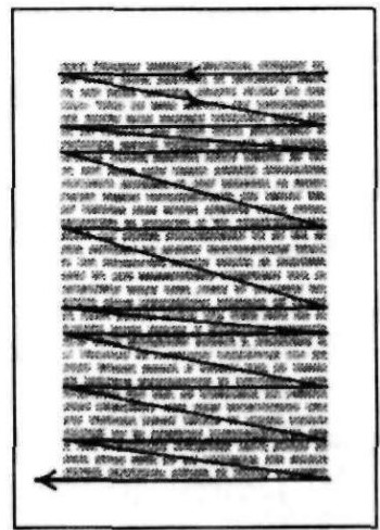 ц